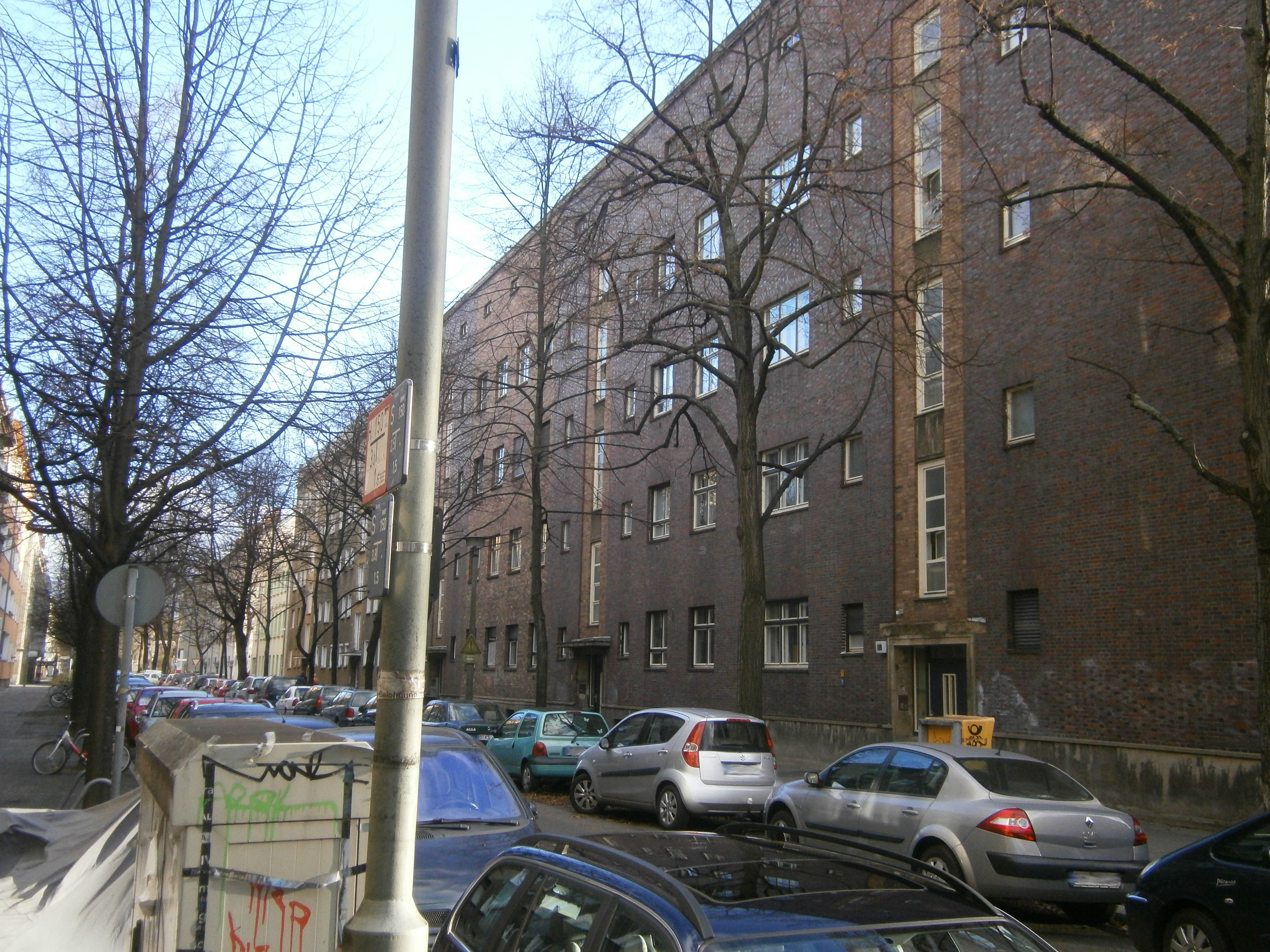 Die Charlottenburger Straße ist eine Straße im Berliner Ortsteil Weißensee, Ortslage Gründerviertel. Im Bild die Wohnanlage mit der Eilveser Straße an der Südseite der Charlottenburger im Blick nach Osten.